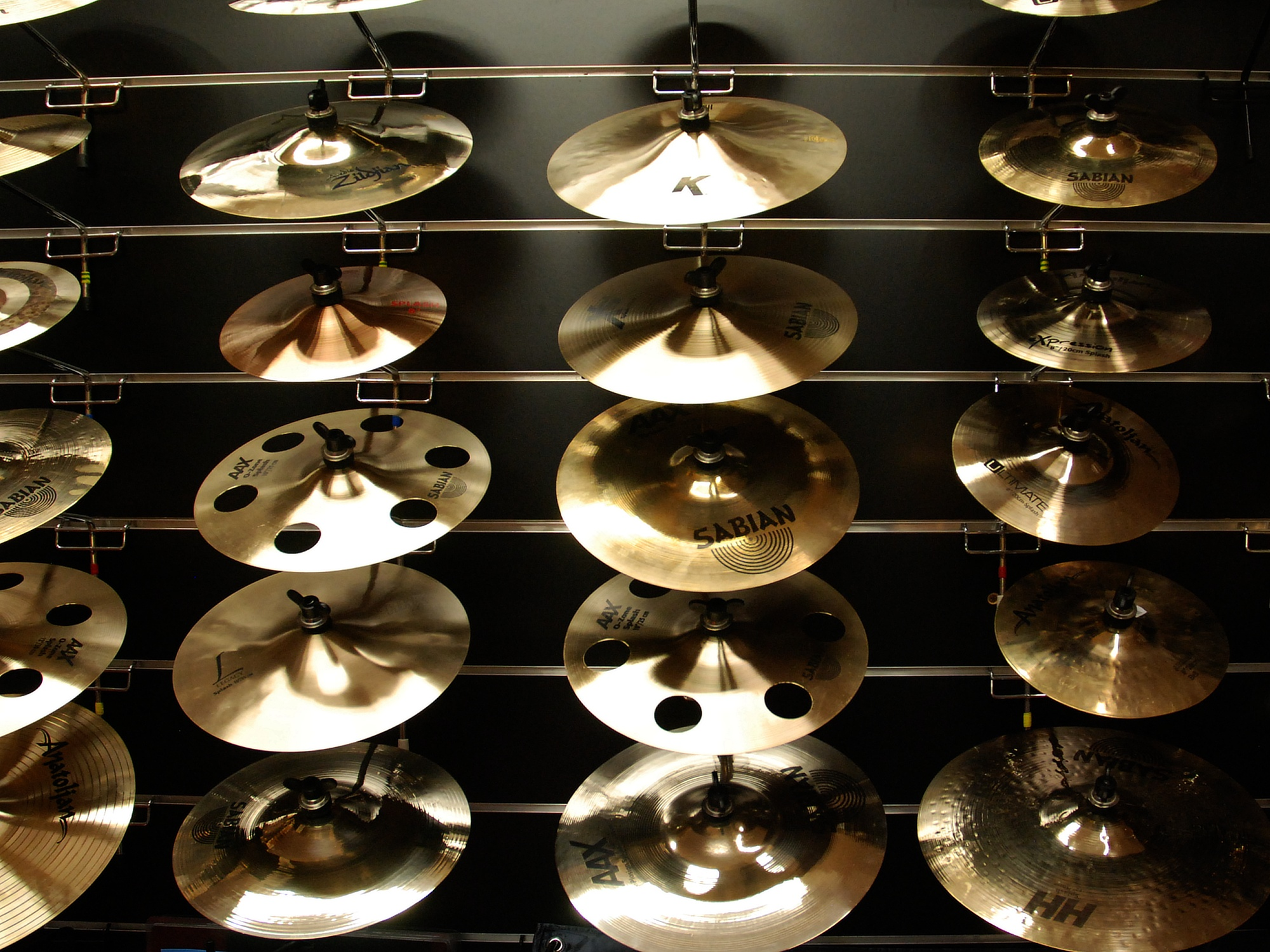 Různé činely